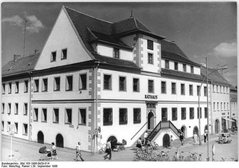 Hoyerswerda, Rathaus ensembles rund um das Renaissance-Rathaus ist Resultat der kommunalpolitischen Partnerschaft des Rates der Stadt mit Betrieben. - Siehe auc Motiv 13 N